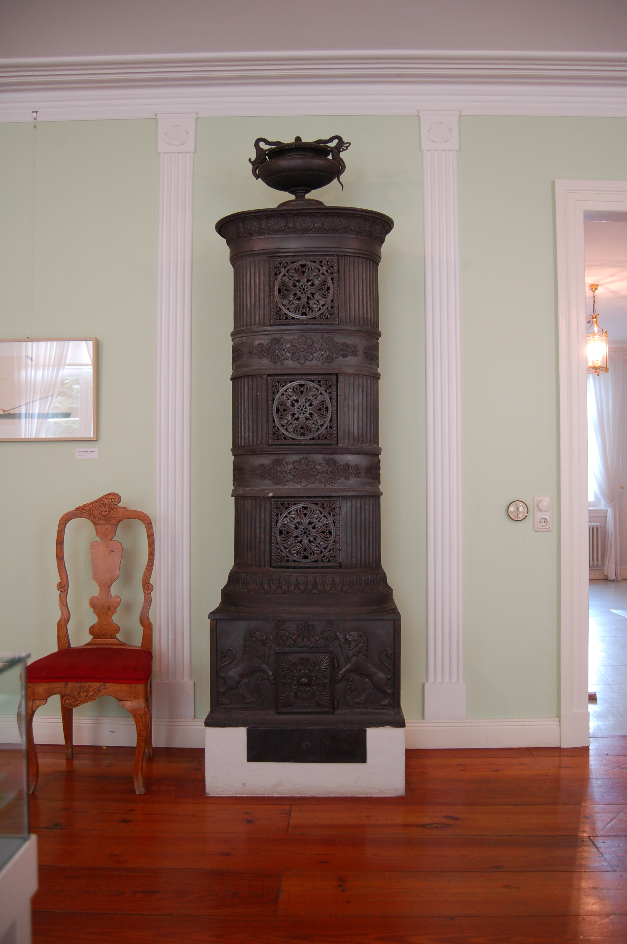 Museum Langes Tannen Uetersen - Heizofen 19. Jahrhundert